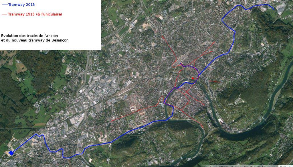 Comparaison des tracés de 1915 (rouge, approximation) et 2015 (bleu)